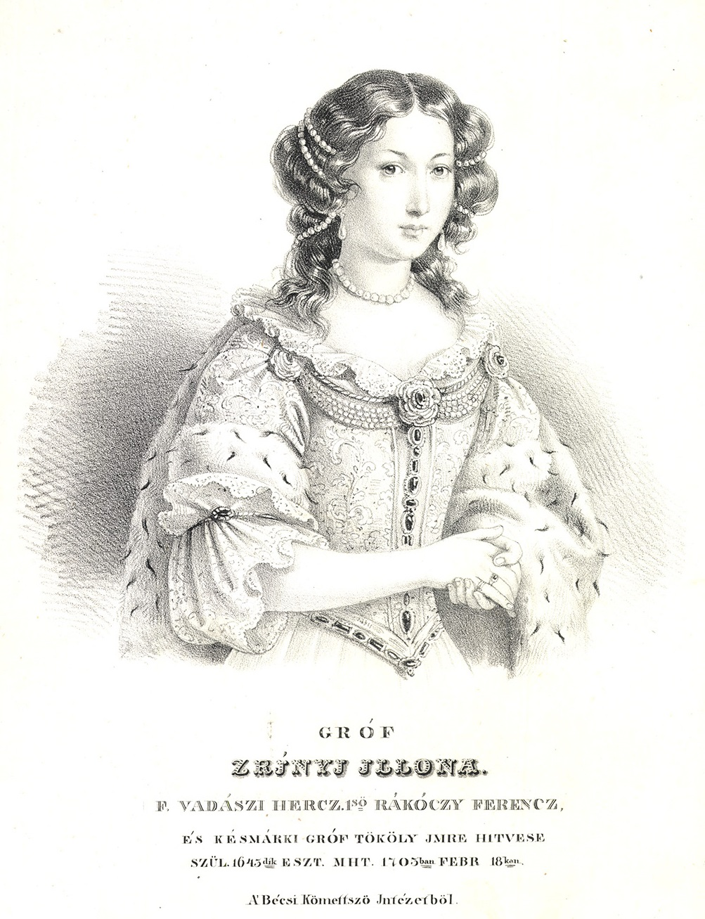 Zrínyi IV. Ilona grófnő, németül: Helena Gräfin Zrinski, horvátul Jelena Zrinska (Ozaly, Horvátország, 1643 vagy 1652– Nikomédia, Anatólia, 1703. február 18.) a magyar történelem egyik hősnője, II. Rákóczi Ferenc édesanyja.